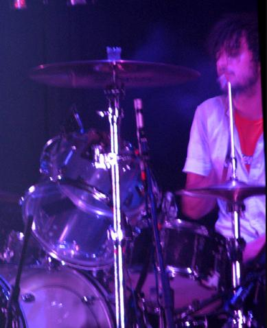 Fabrizio Moretti